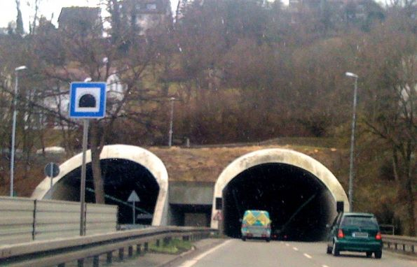 Nordportal des Schlossbergtunnels der B28 in Tübingen